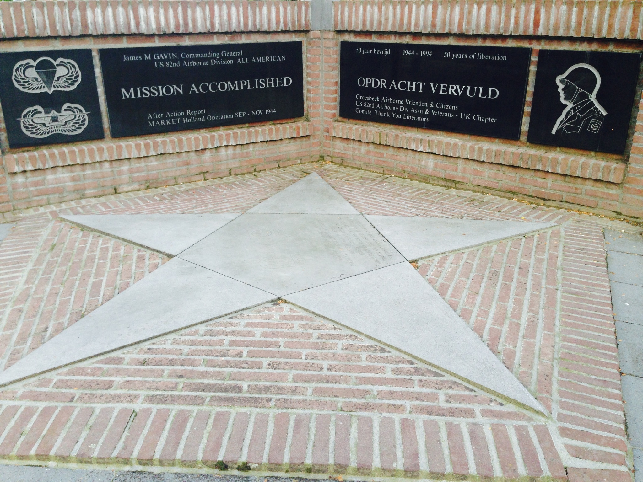 Oorlogsmonument, Generaal Gavinstraat 2 Groesbeek NL